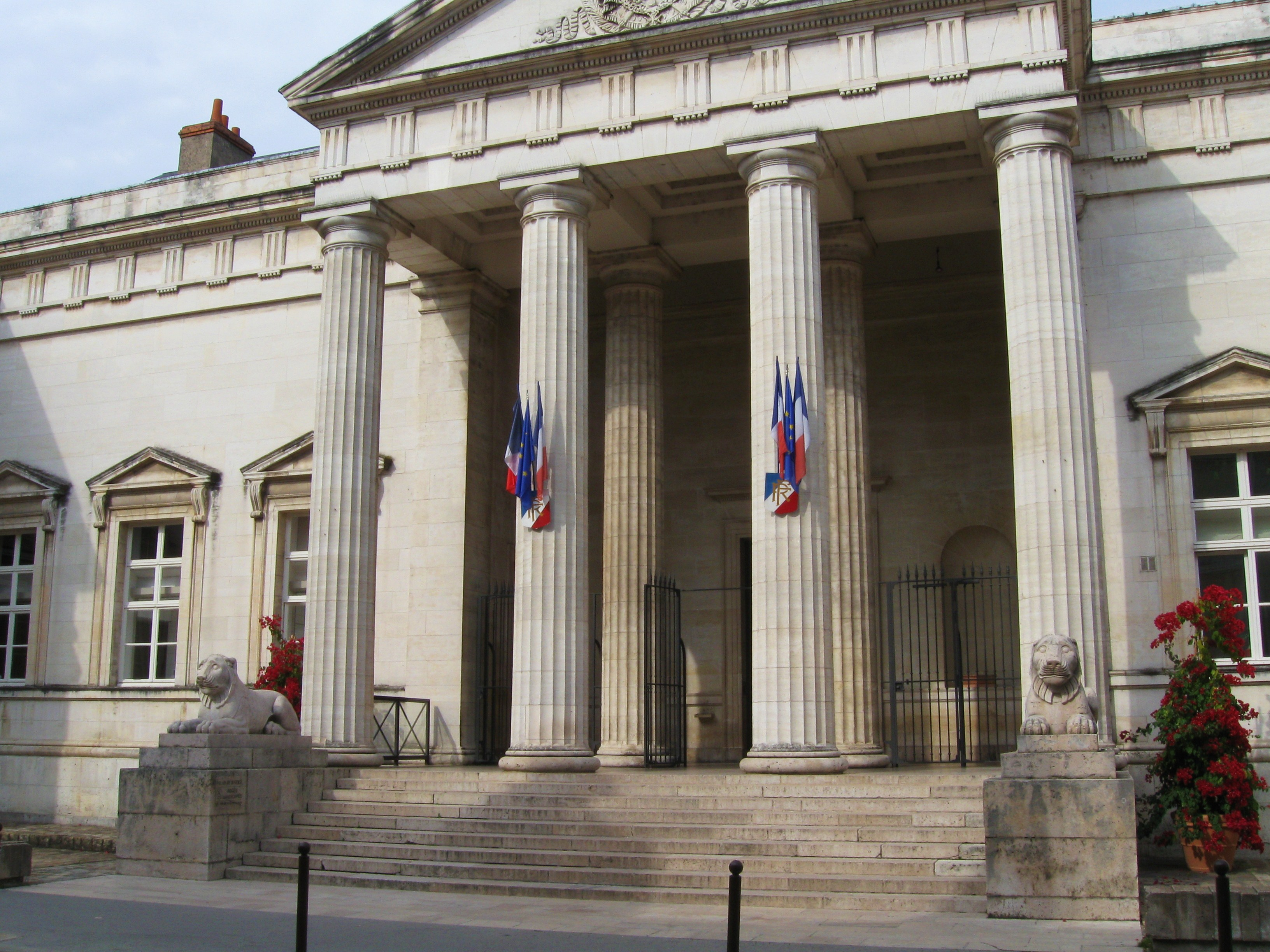 Palais de justice, Orléans, Loiret, France